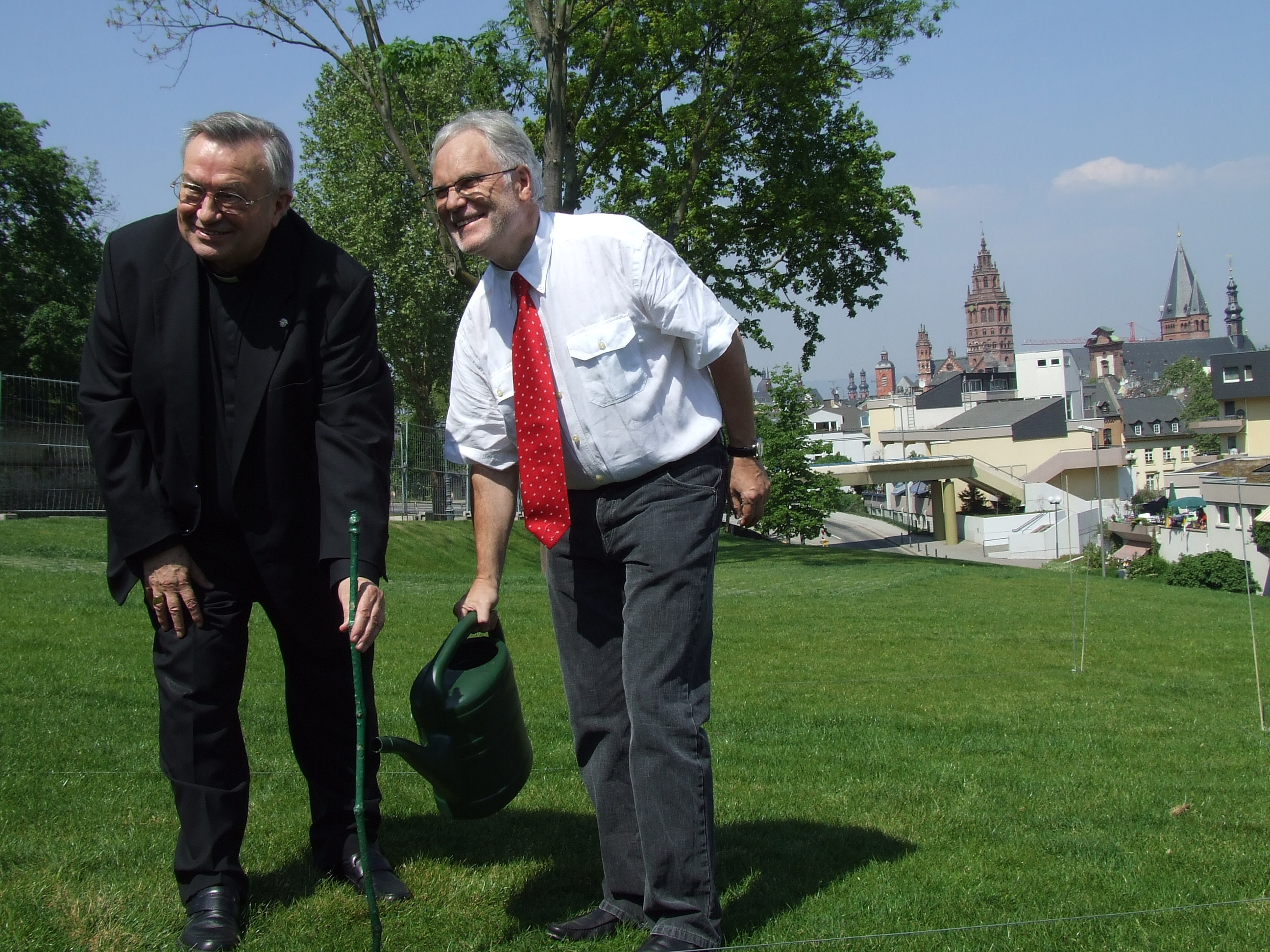 Kardinal Lehmann und ZDF-Intendant Markus Schächter bei der Einweihung des Prominenten-Weinberges in Mainz. Im Hintergrund der Mainzer Dom.